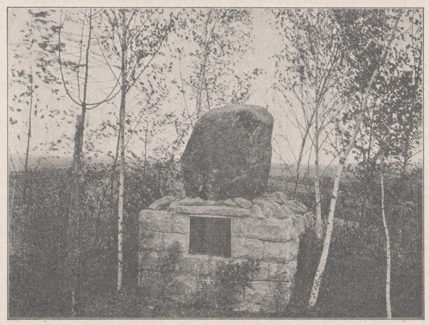 Ursprüngliche Ansicht des Napoleon-Denkmals bei Utzberg (1913)